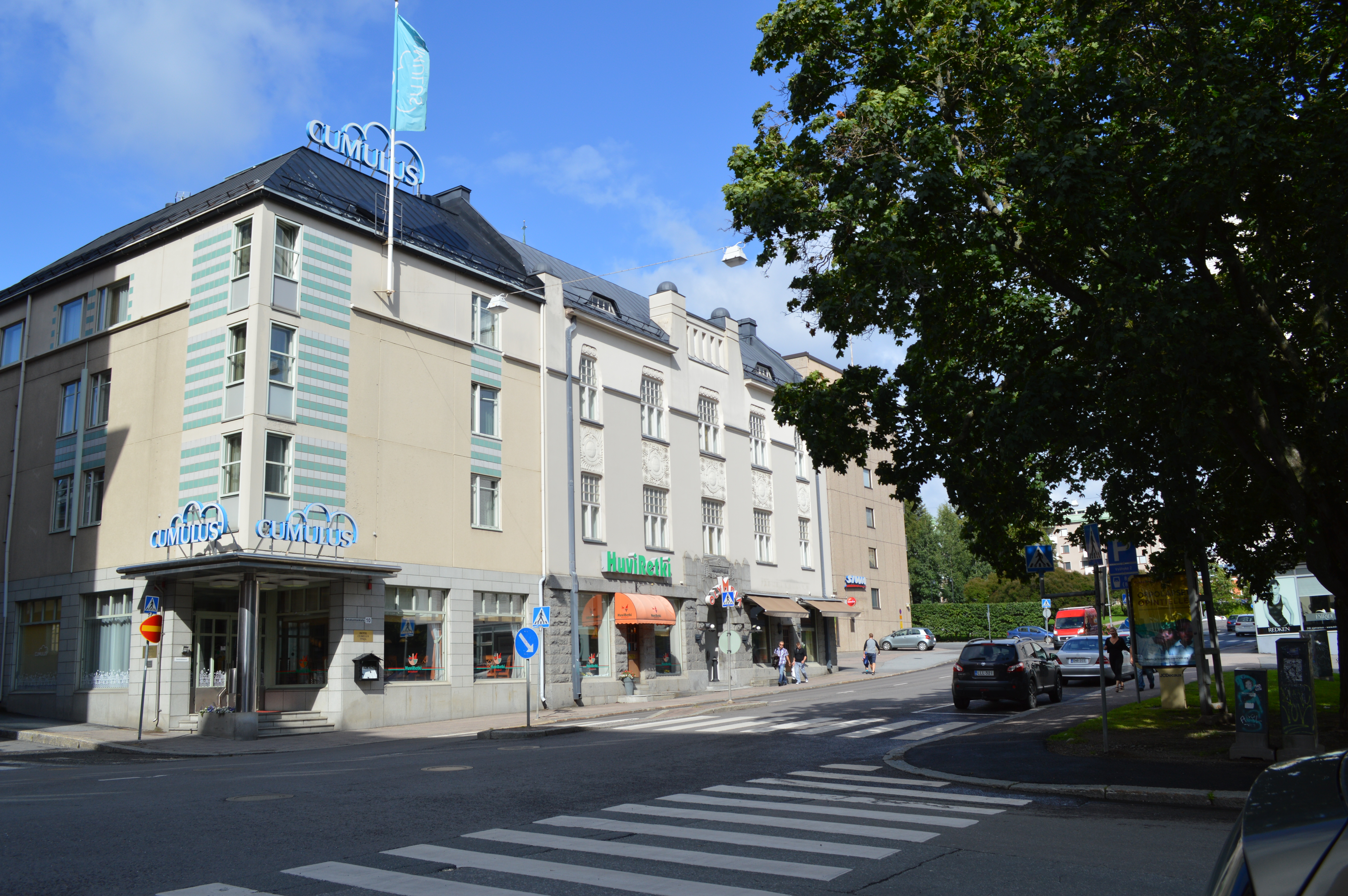 Tampereen Ulkotyöväenyhdistyksen talo, vasemmalla uudempi hotellin lisäosa ja oikealla